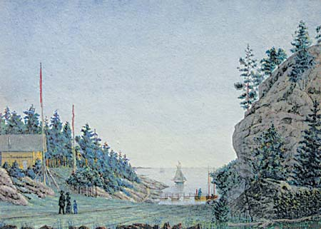 Akvarell fra Hankø